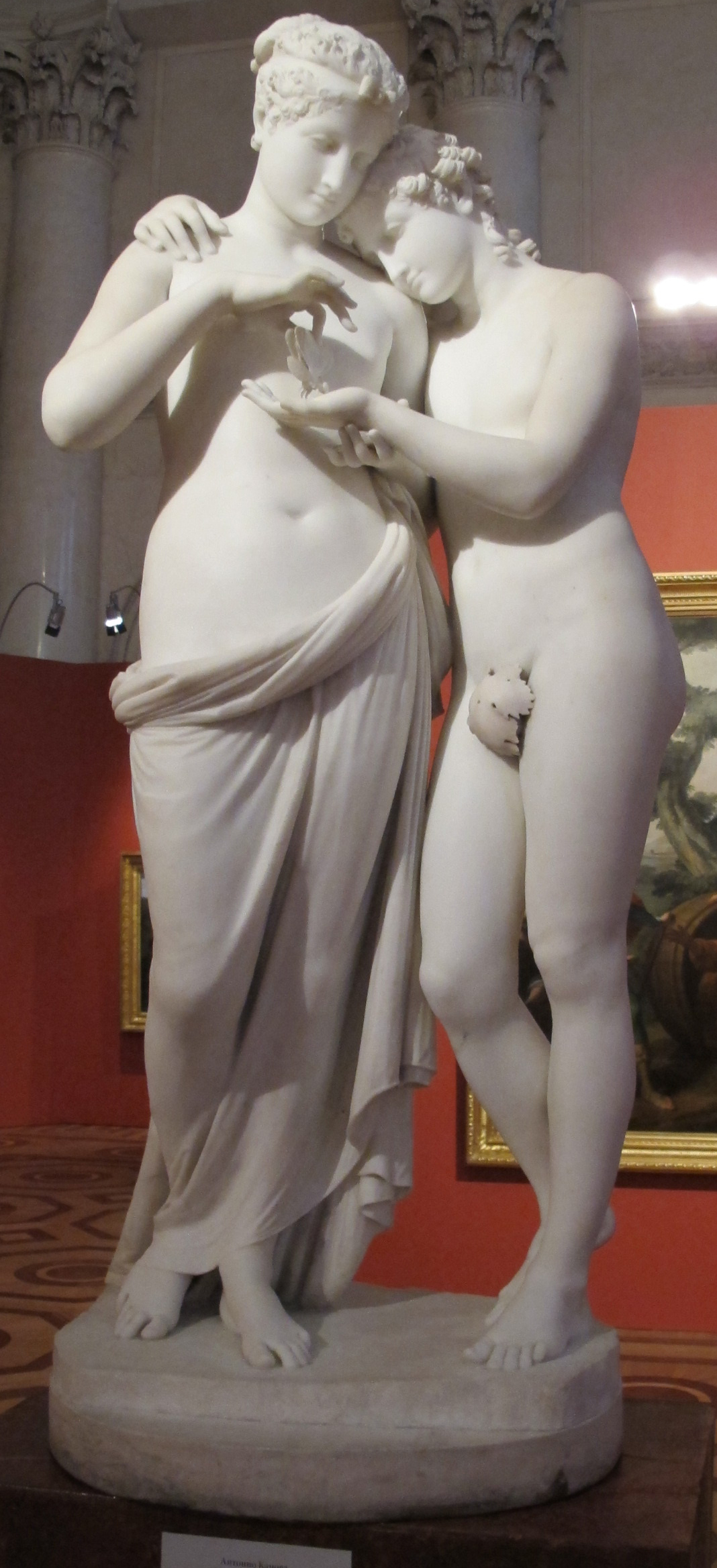 Antonio canova, cupido e psiche, 1800-1803